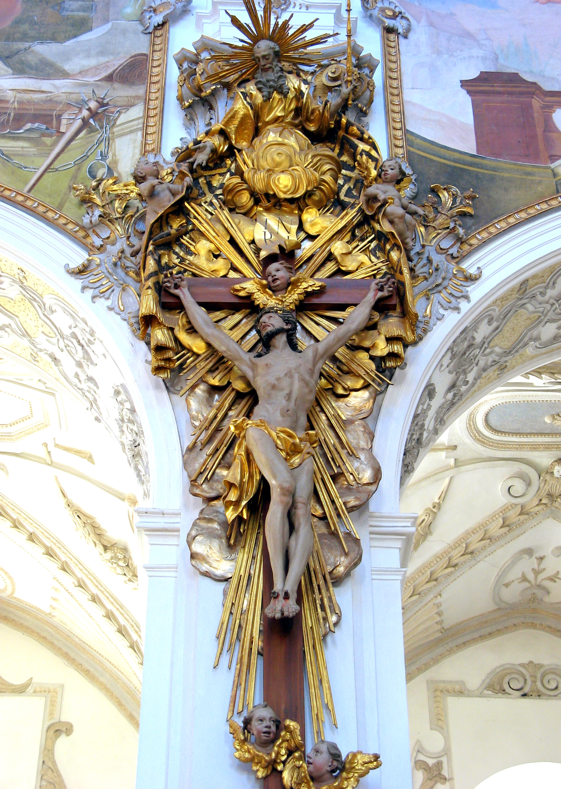 Gnadenstuhl von Anton Sturm in der Pfarrkirche in Steingaden